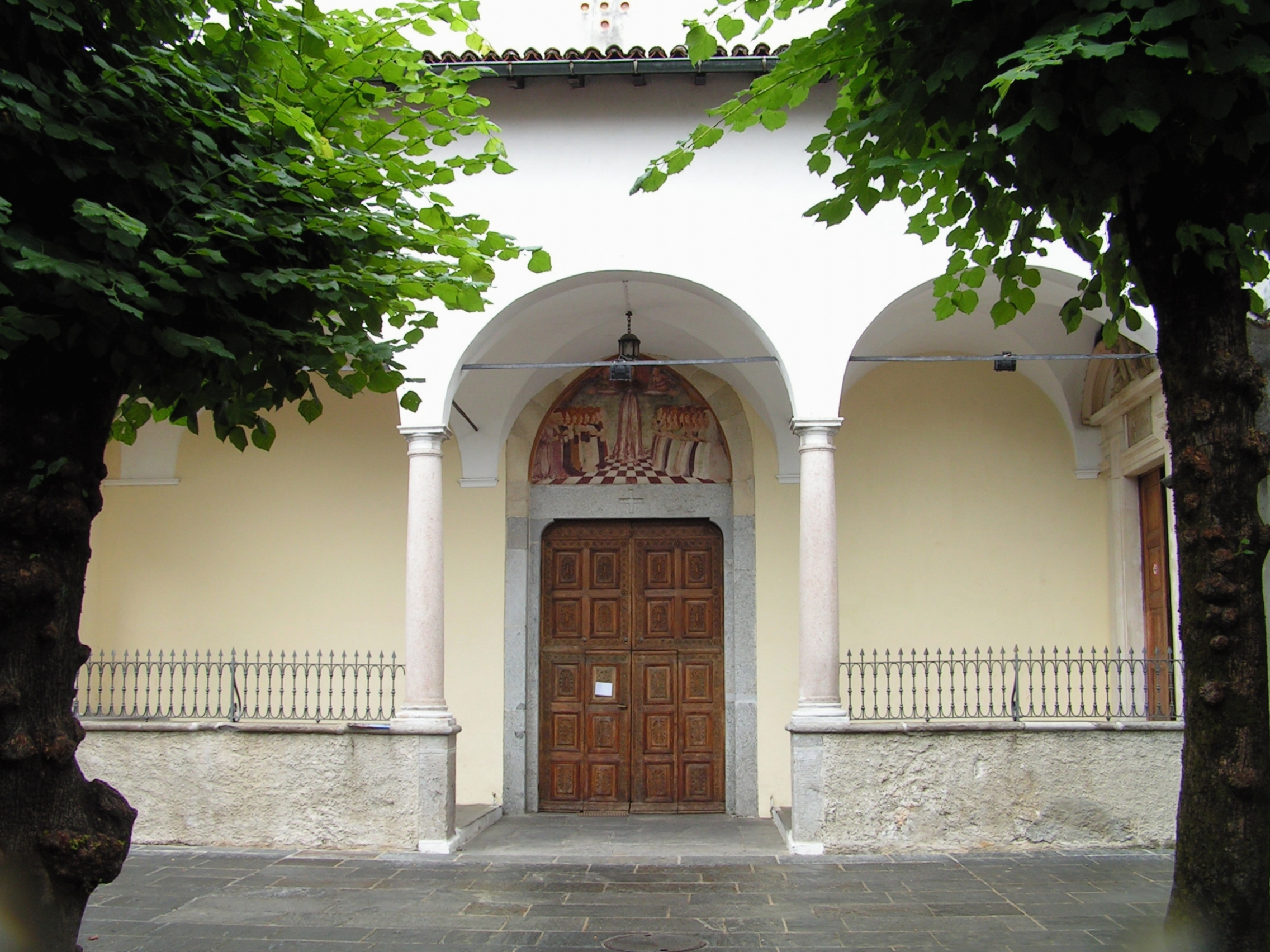 Via delle Cappelle 1, Ascona. Chiesa di S. Maria della Misericordia.